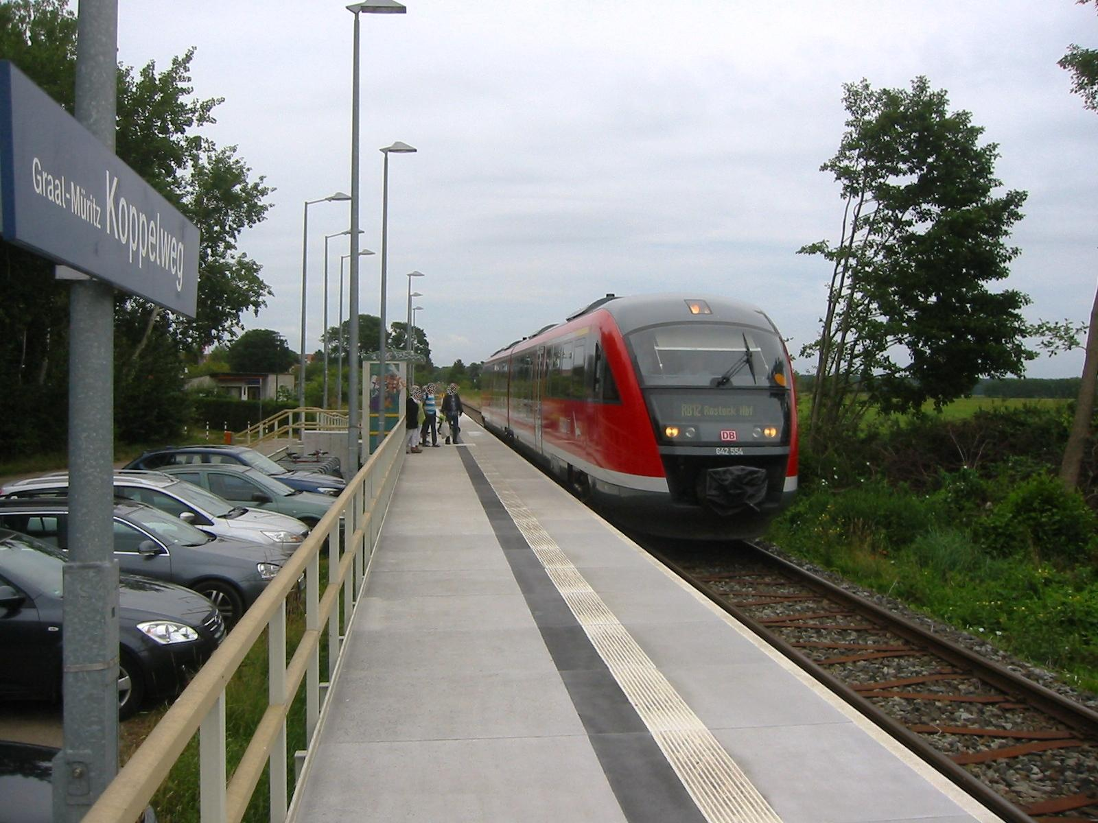 Triebwagen der Baureihe 642 im Haltepunkt Graal-Müritz Koppelweg.